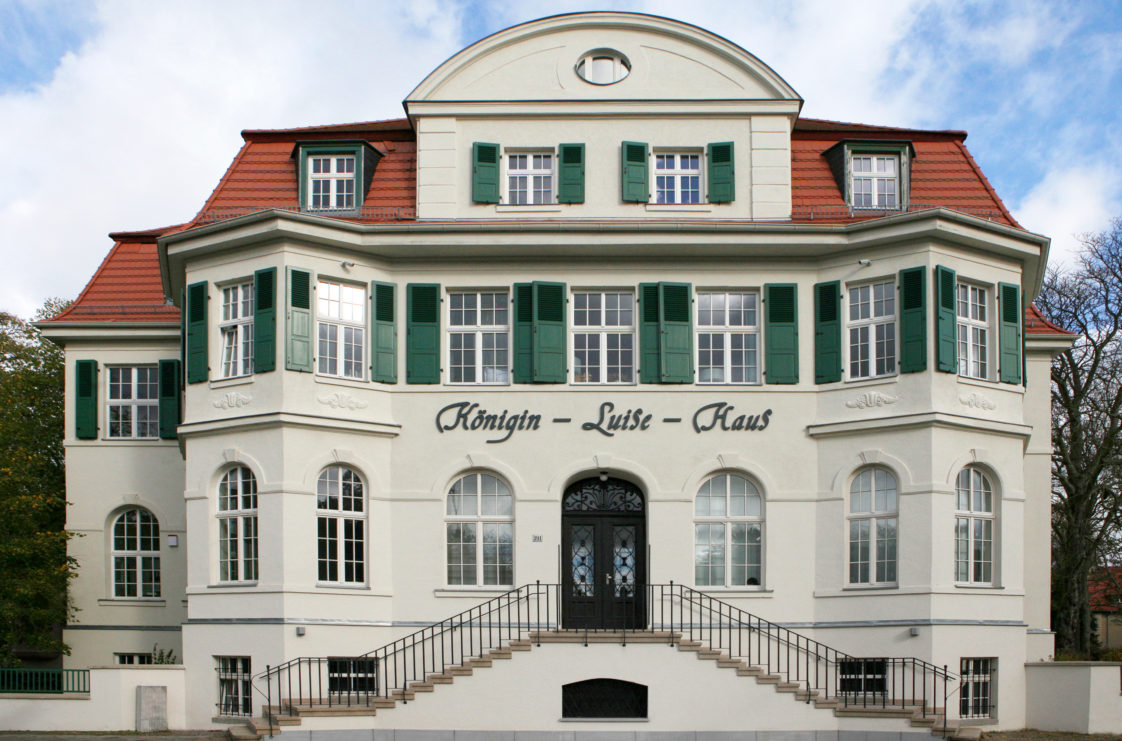 Aufnahme Oktober 2017